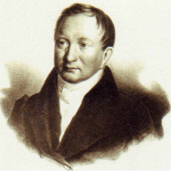 Carl Ludwig Wimmel, Hamburger Stadtbaumeister, Lithografie um 1830